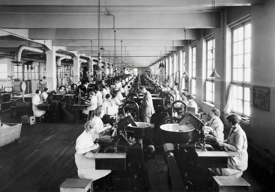 Tobaksmonopoletets fabrikslokaler